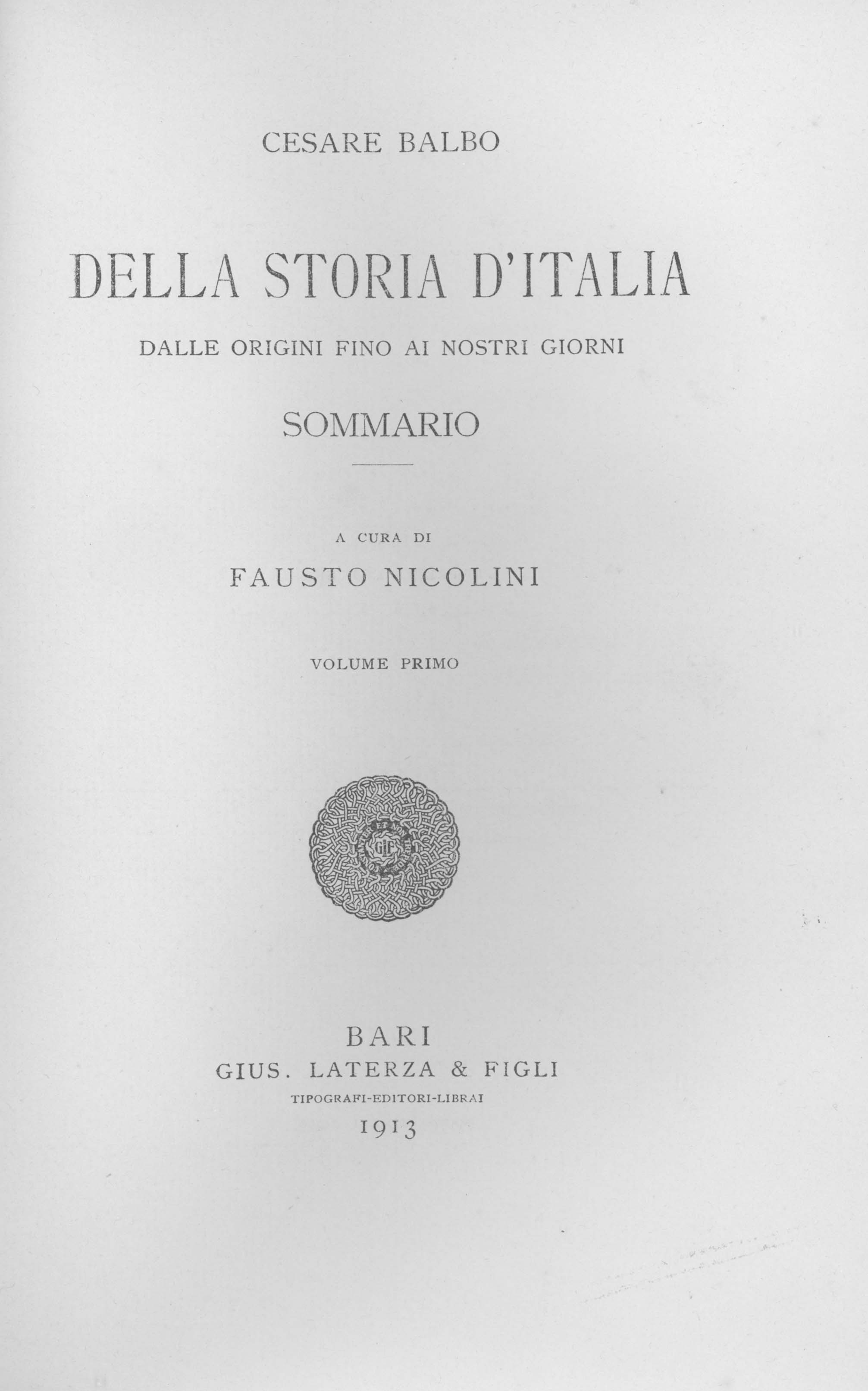 Della storia d'Italia dalle origini fino ai nostri giorni : sommario. 1 / Cesare Balbo ; a cura di Fausto Nicolini. - Bari : G. Laterza & Figli, 1913. - 303 p. ; 22 cm. - (Scrittori d'Italia ; 50) .